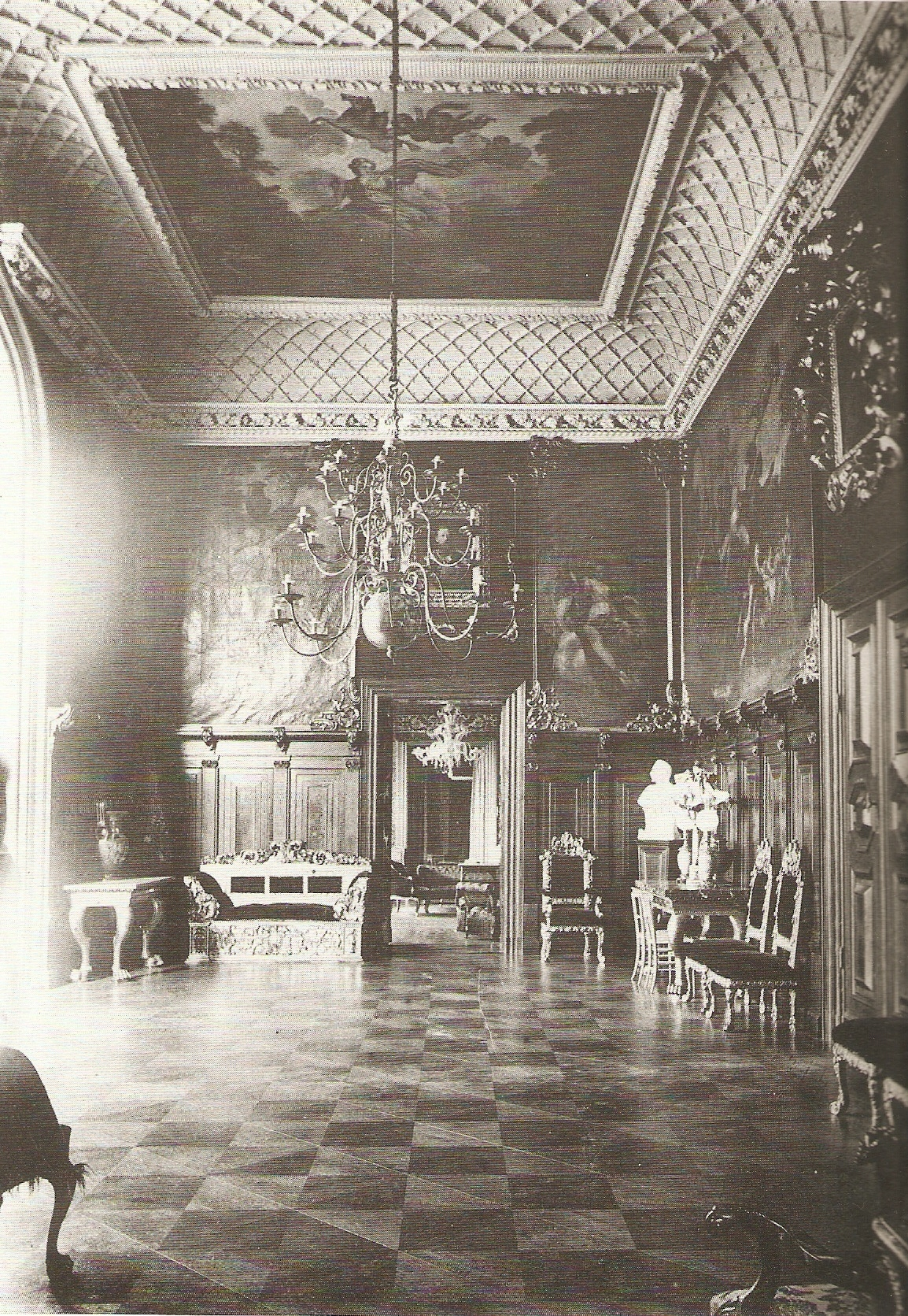 Sala wielka w pałacu Radolińskich w Jarocinie, rok 1908.